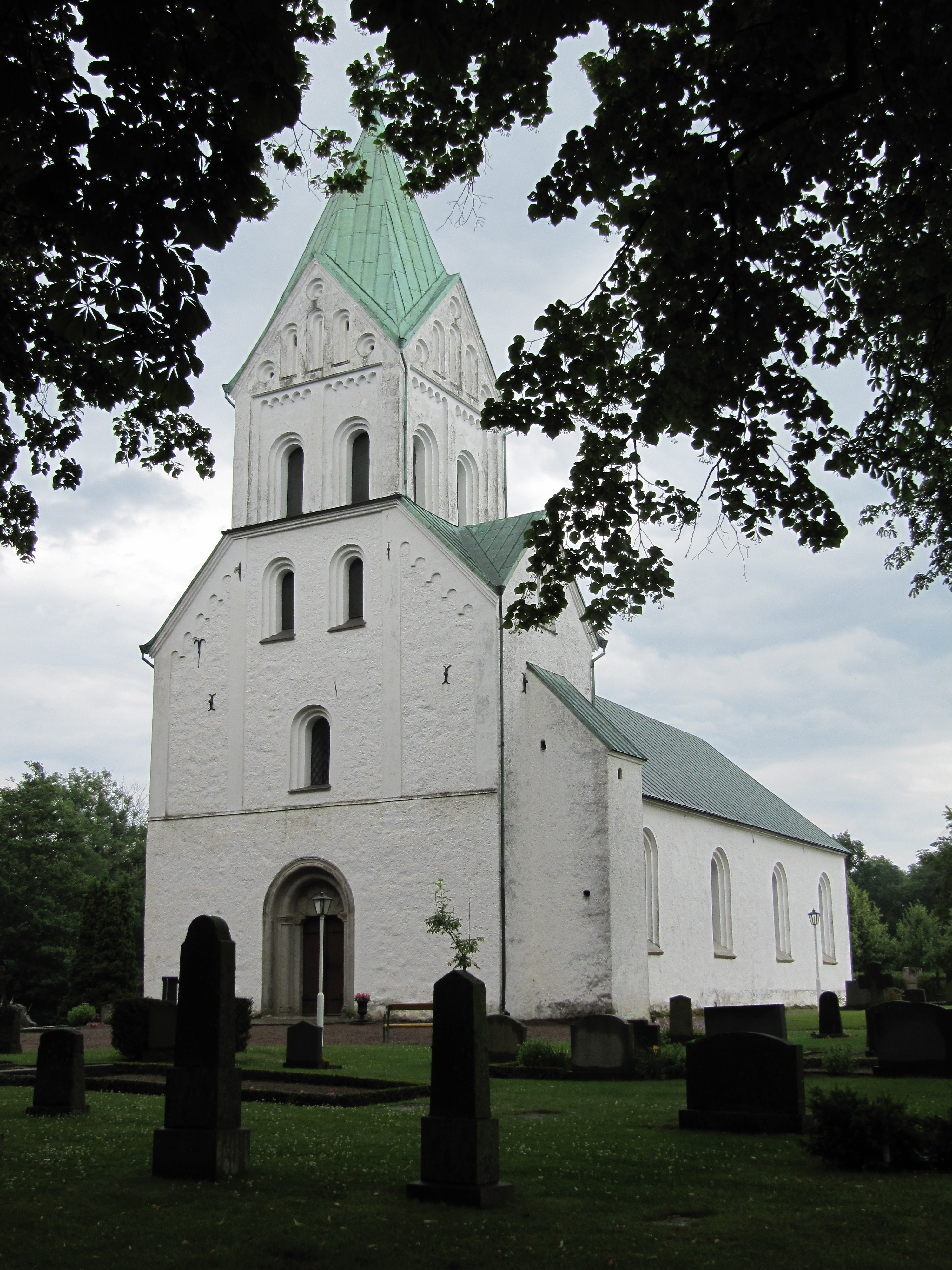 Össjö kyrka